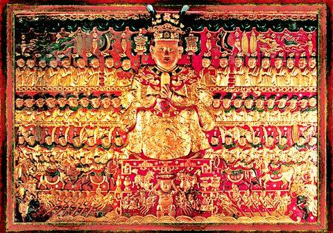 phù điêu